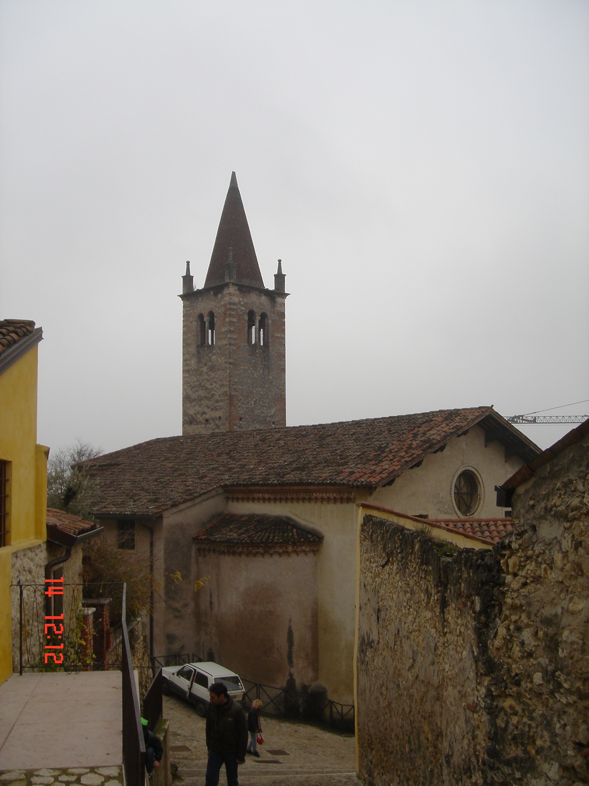 Chiesa a Soave